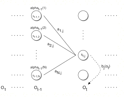 شکل4: احتمالات پیشرو